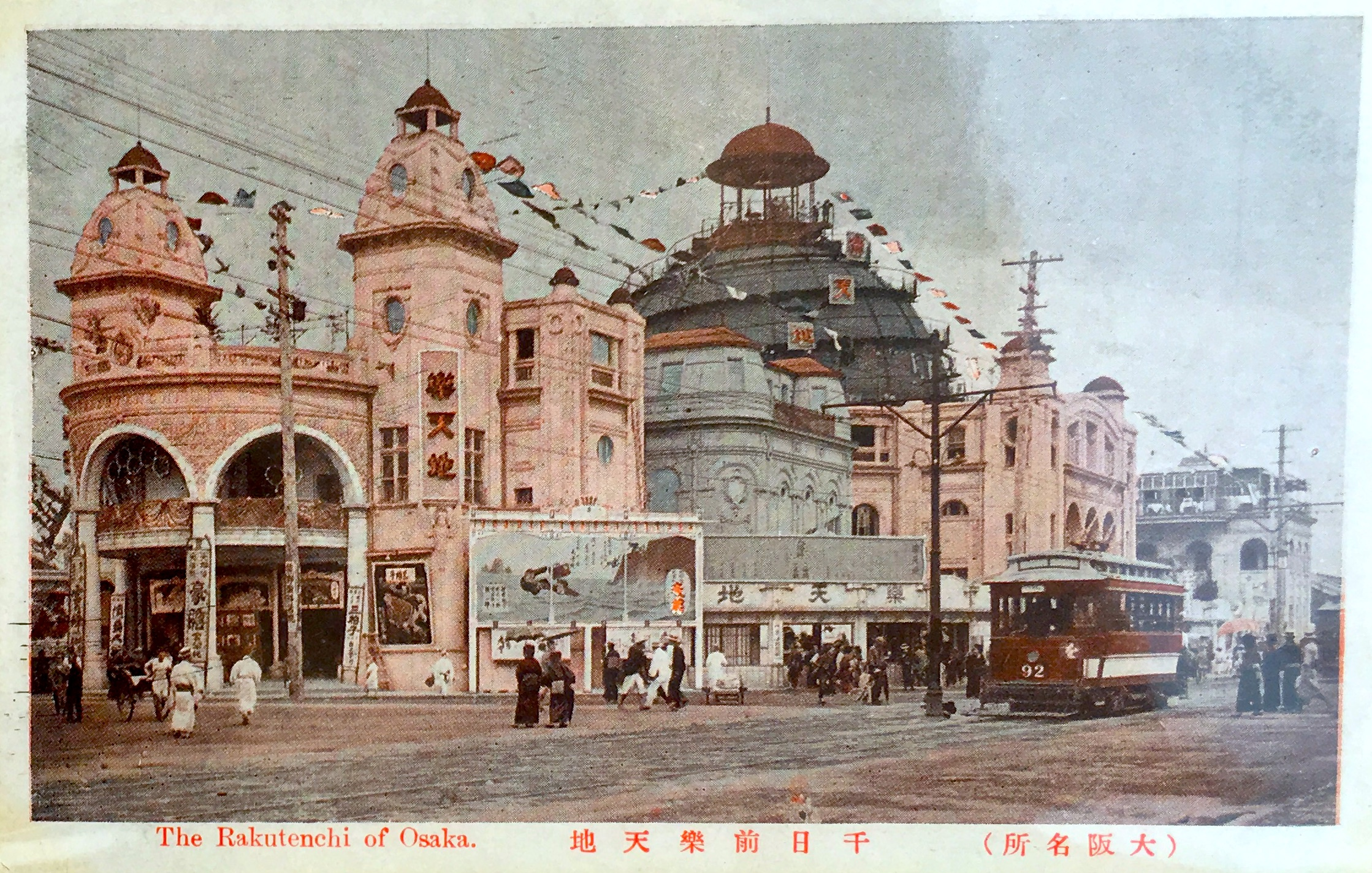 楽天地 (Rakutenchi)